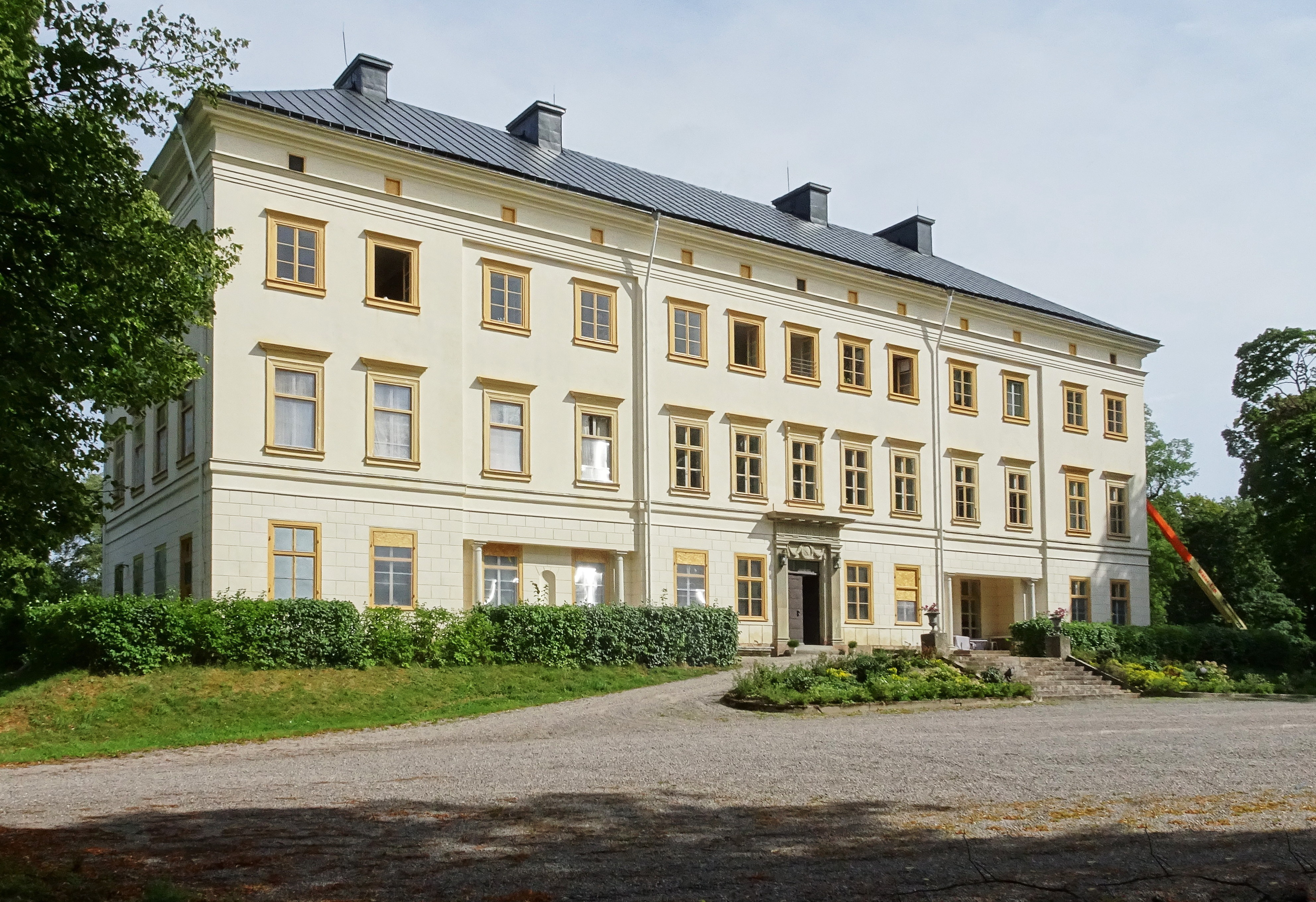 Lennartsnäs